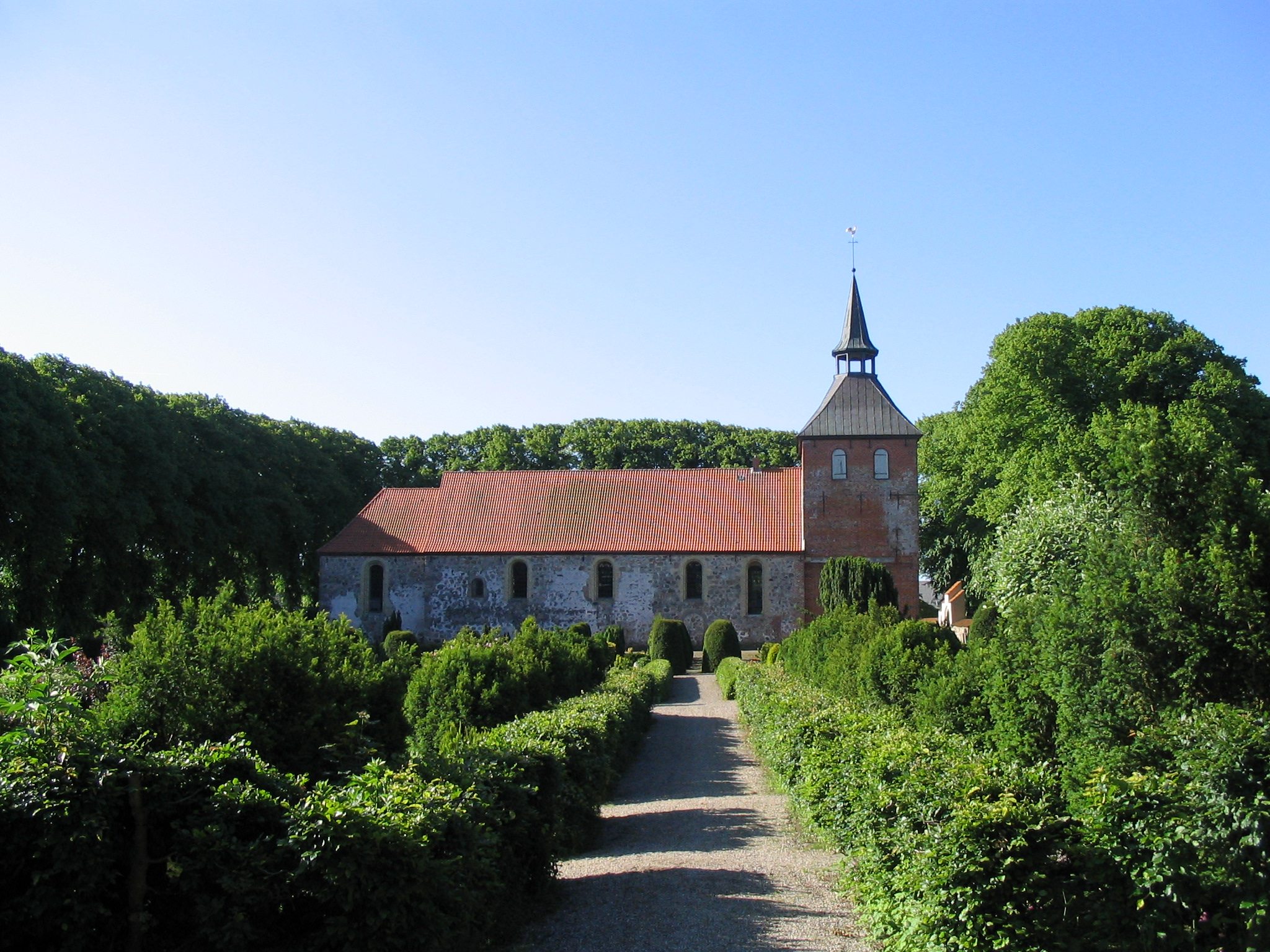 Marienkirche Grundhof (Ansicht von Norden)